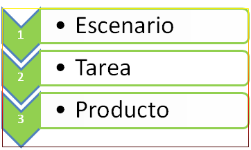 Estructura de la MiniqQuest